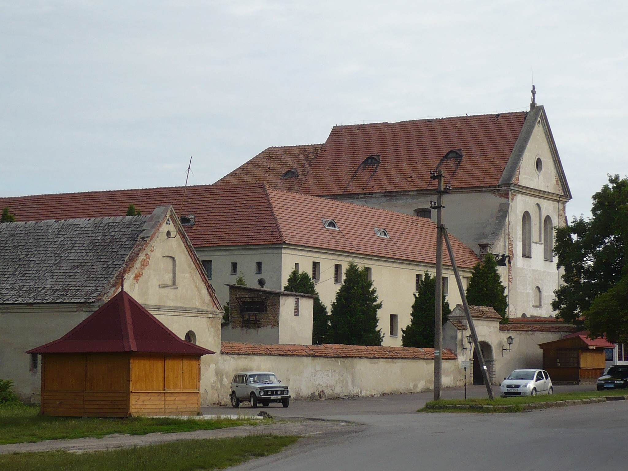 Olesko, klasztor